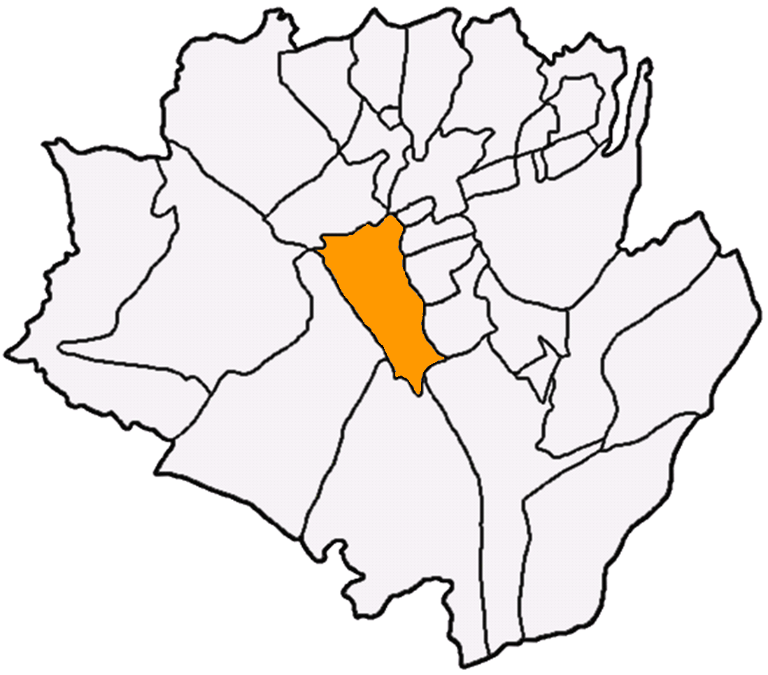 上林里在龍潭區 (台灣)的位置